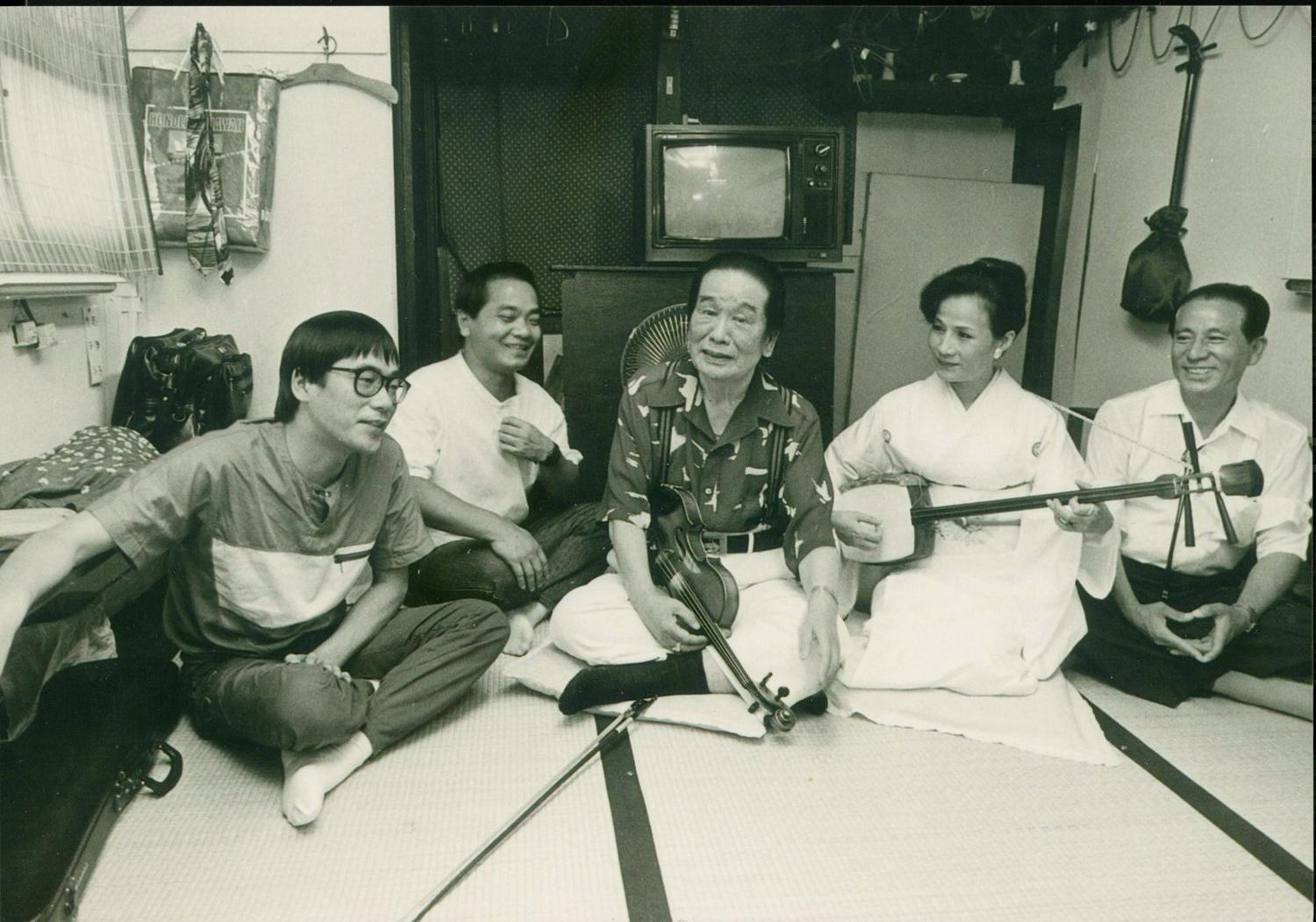 新花月の楽屋にて1983～5年頃に撮影されたもの。写真左から浮世亭十吾、浮世亭三吾、西川ヒノデ、明尾美ゆき（のちの萩本果穂）、芸名不詳（すみません思い出せません）